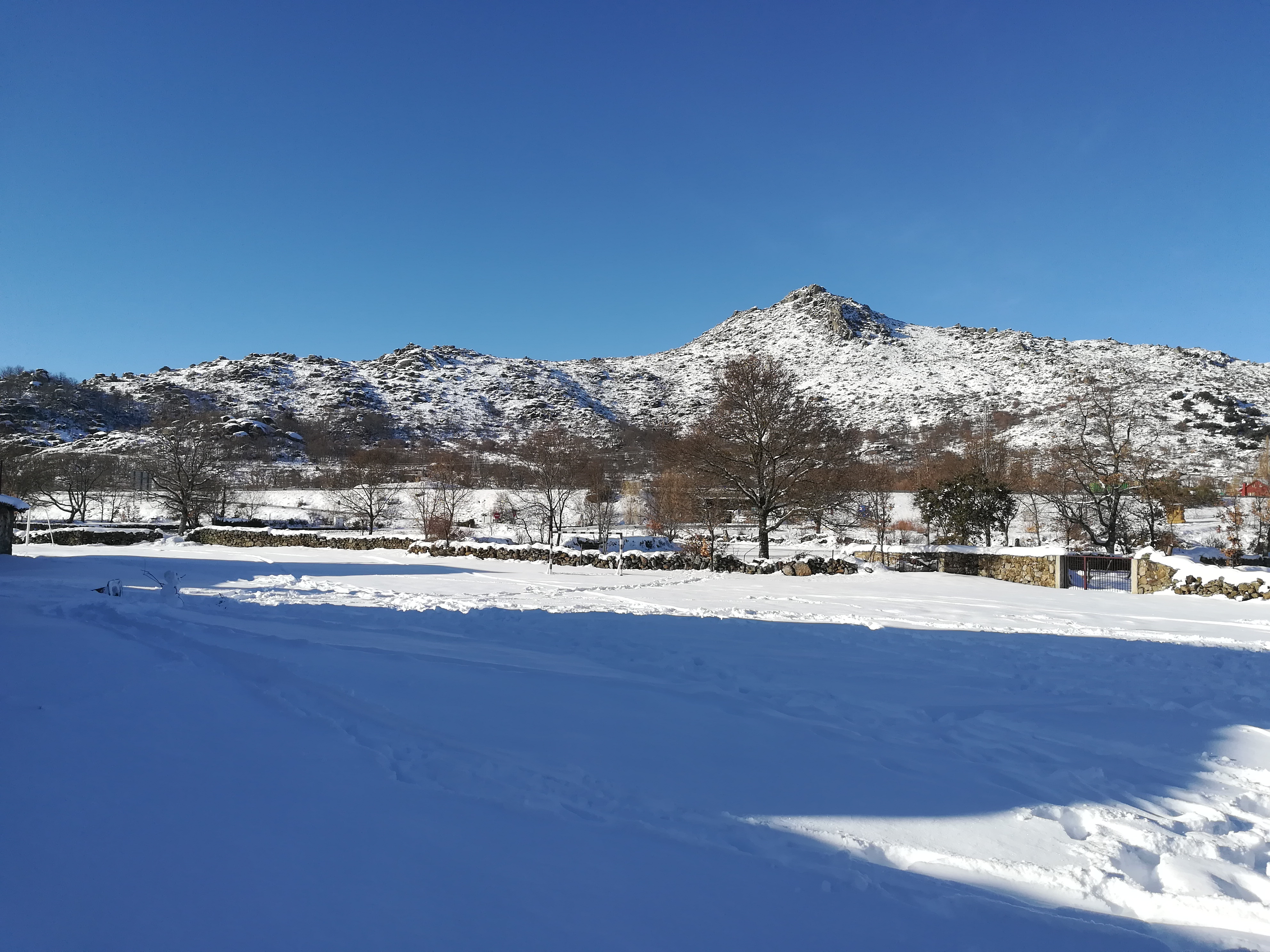 Cabeza Gorda nevada